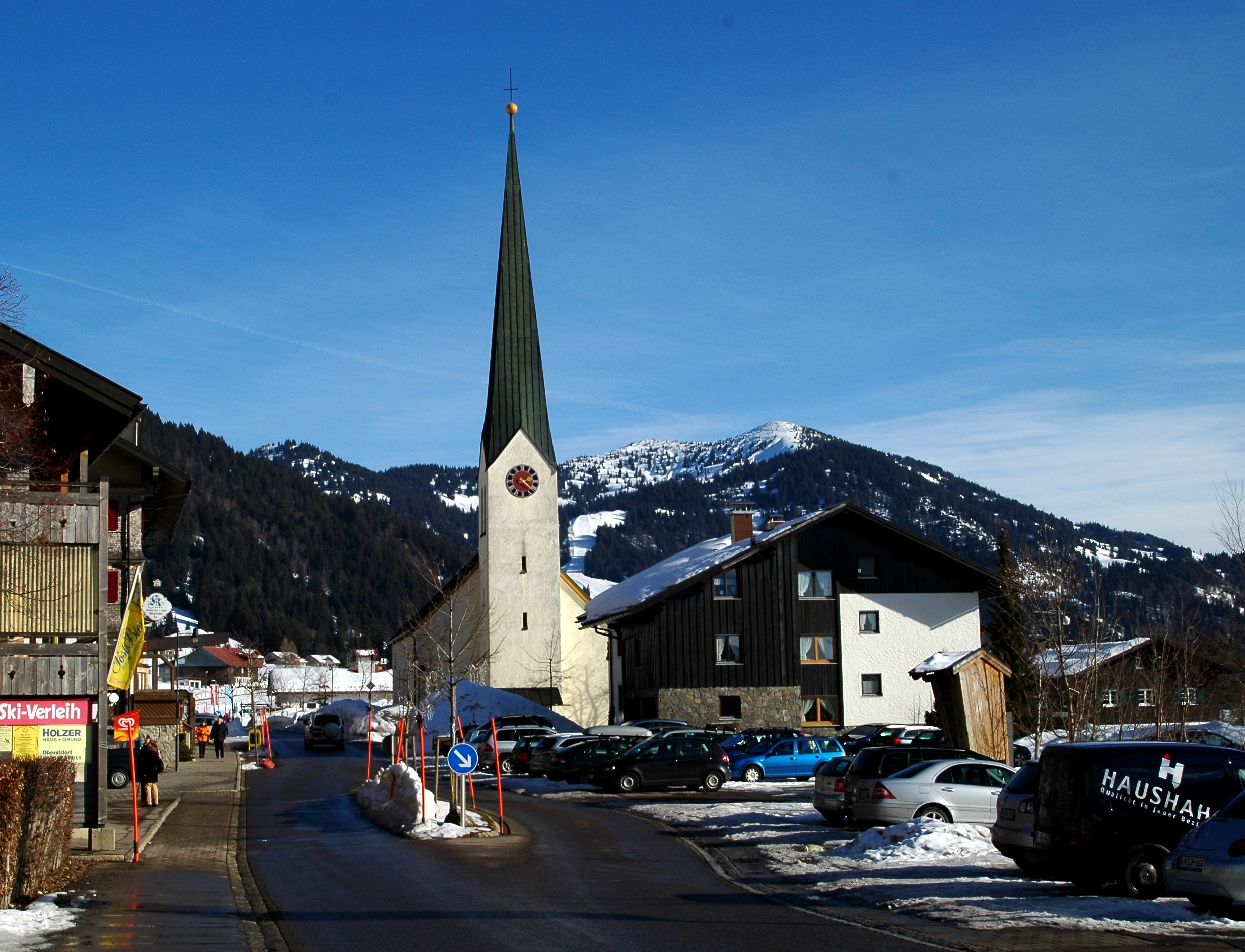 Balderschwang (1044 m): Ortsmitte mit Kirche.